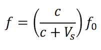 Dopplerjeva enačba